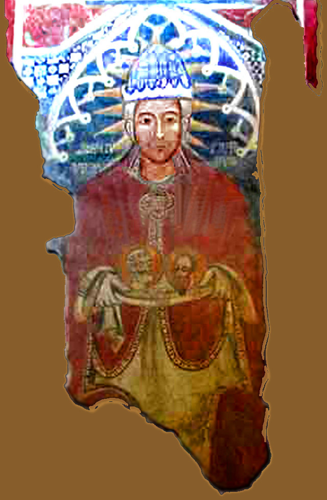 Fresque du XIVe siècle de l'église de Casaranello, Italie, représentant Urbain V